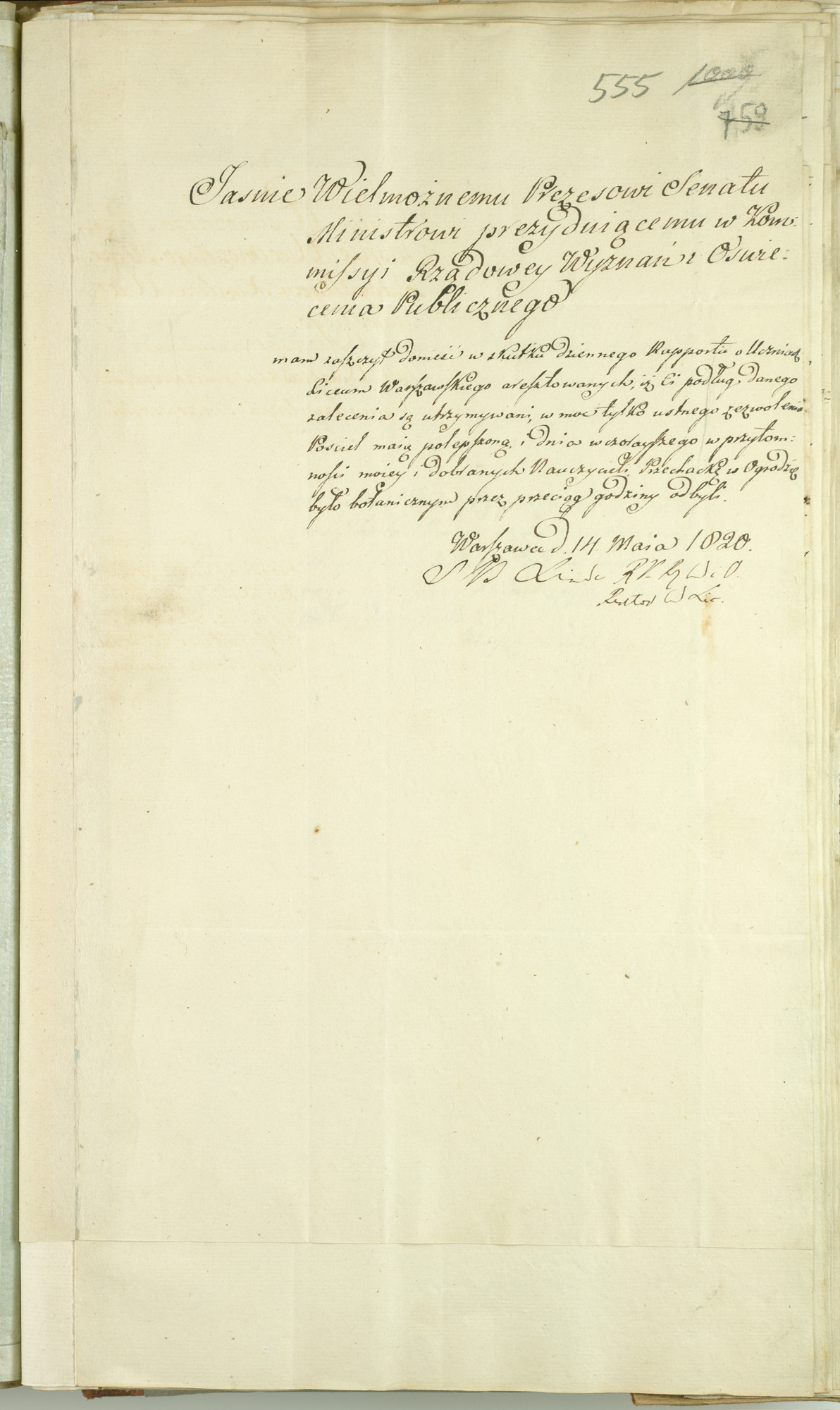 Raporty dzienne Samuela Lindego, kierownika Liceum Warszawskiego, dla Stanisława Kostki Potockiego, prezesa senatu i ministra w Komisji Rządowej Wyznań i Oświecenia dotyczące aresztowanych uczniów Liceum: Rudolfa i Seweryna Skarżyńskich oraz Stefana Paprockiego.